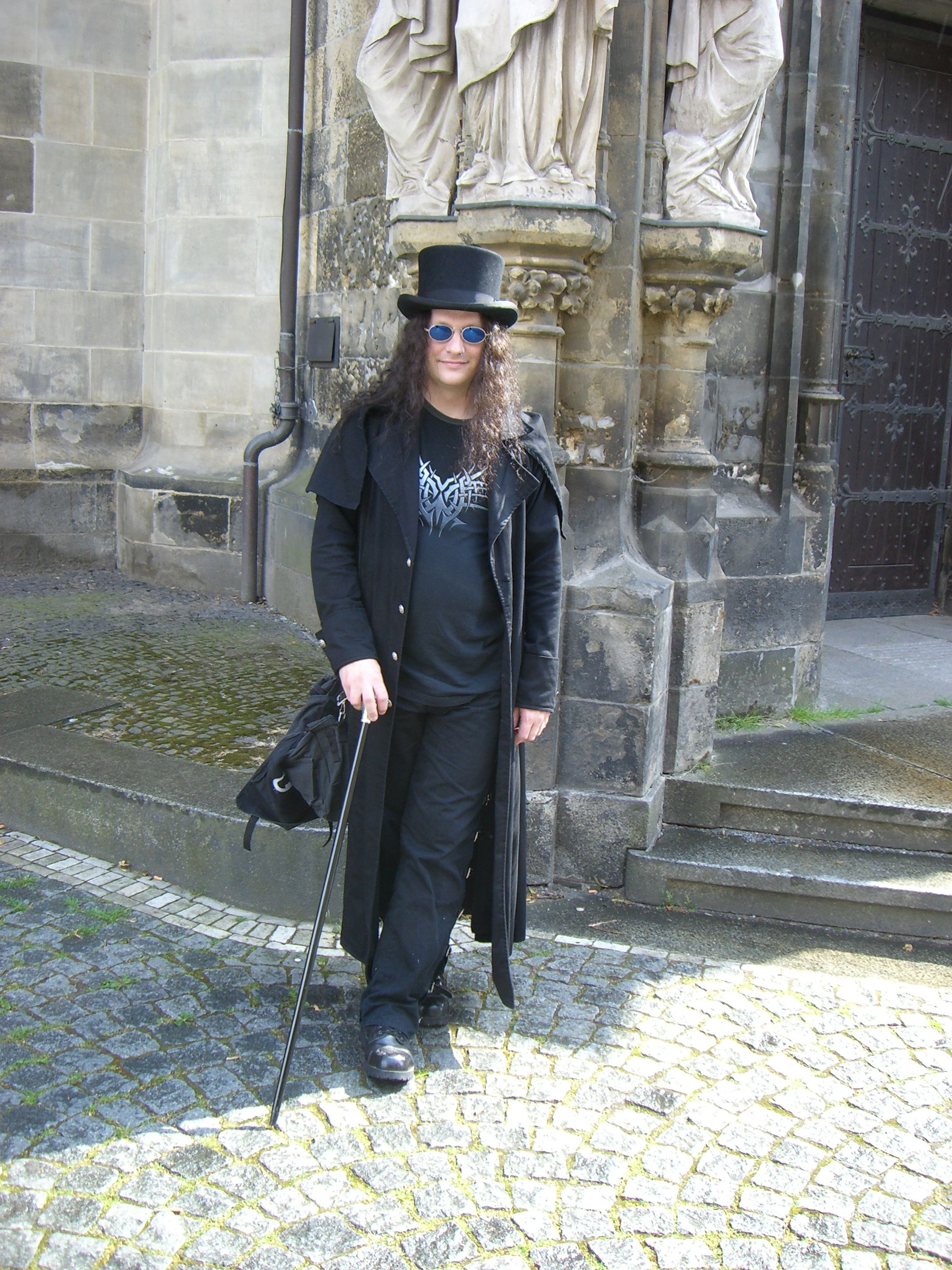 dunkelmunkel